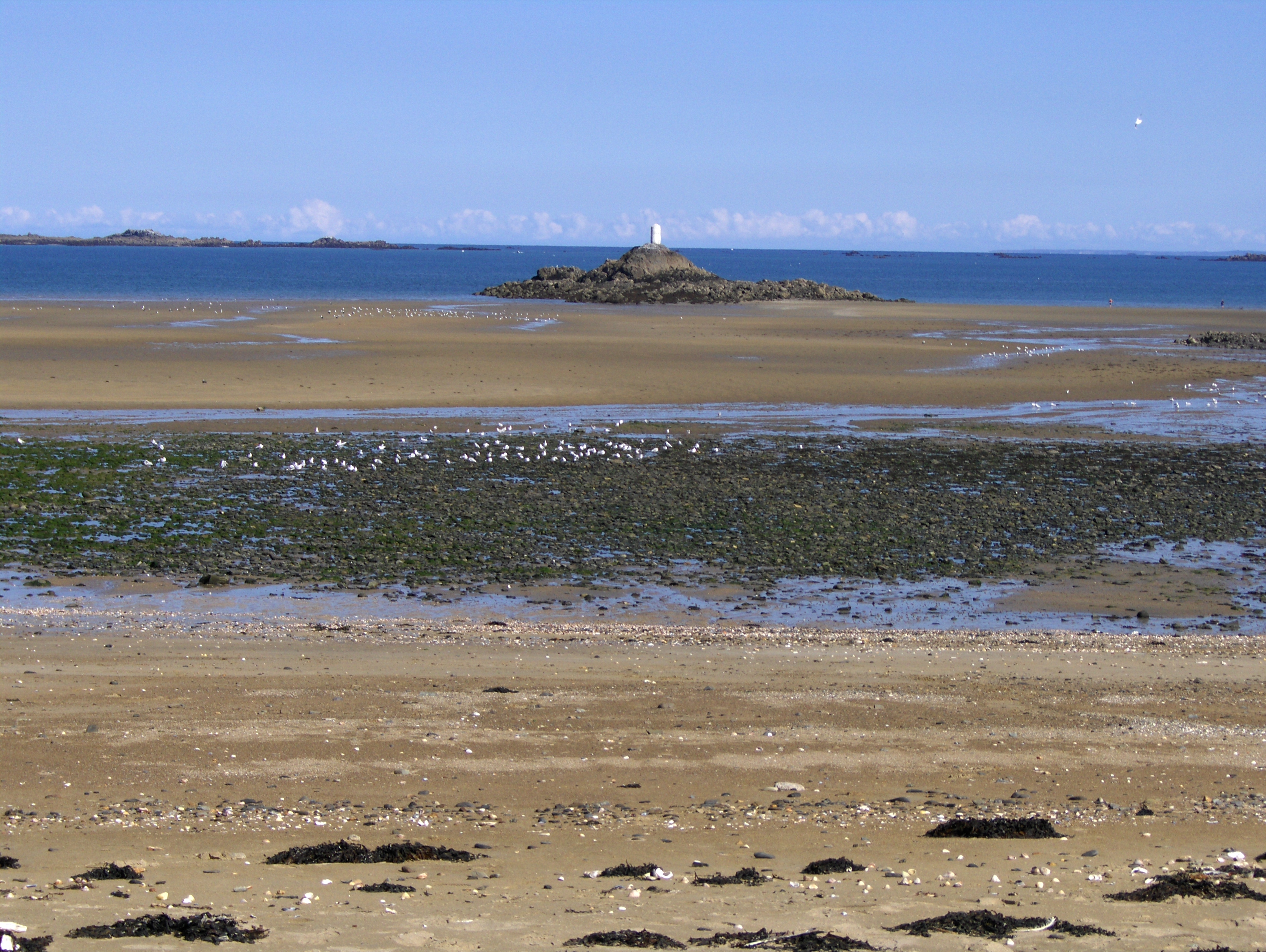 Plage du Moulin à Étables sur Mer. Rocher de la Fille juste en face, avec la balise du rocher le Four qui se trouve immédiatement derrière. Au fond à gauche, les roches de Saint-Quai (appellation maritime).